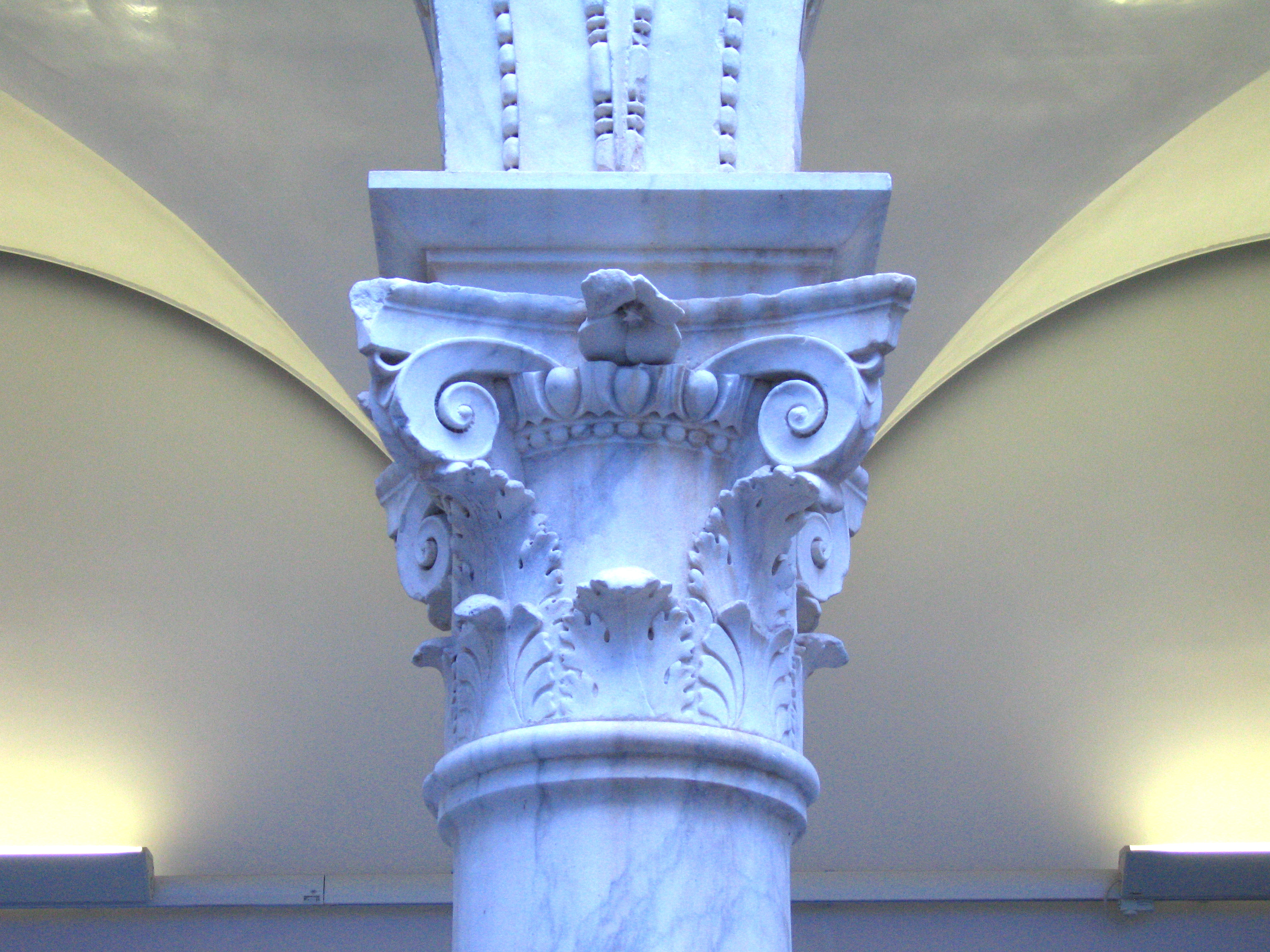 Pati de l'Ambaixador Vich, sant pius V (València)